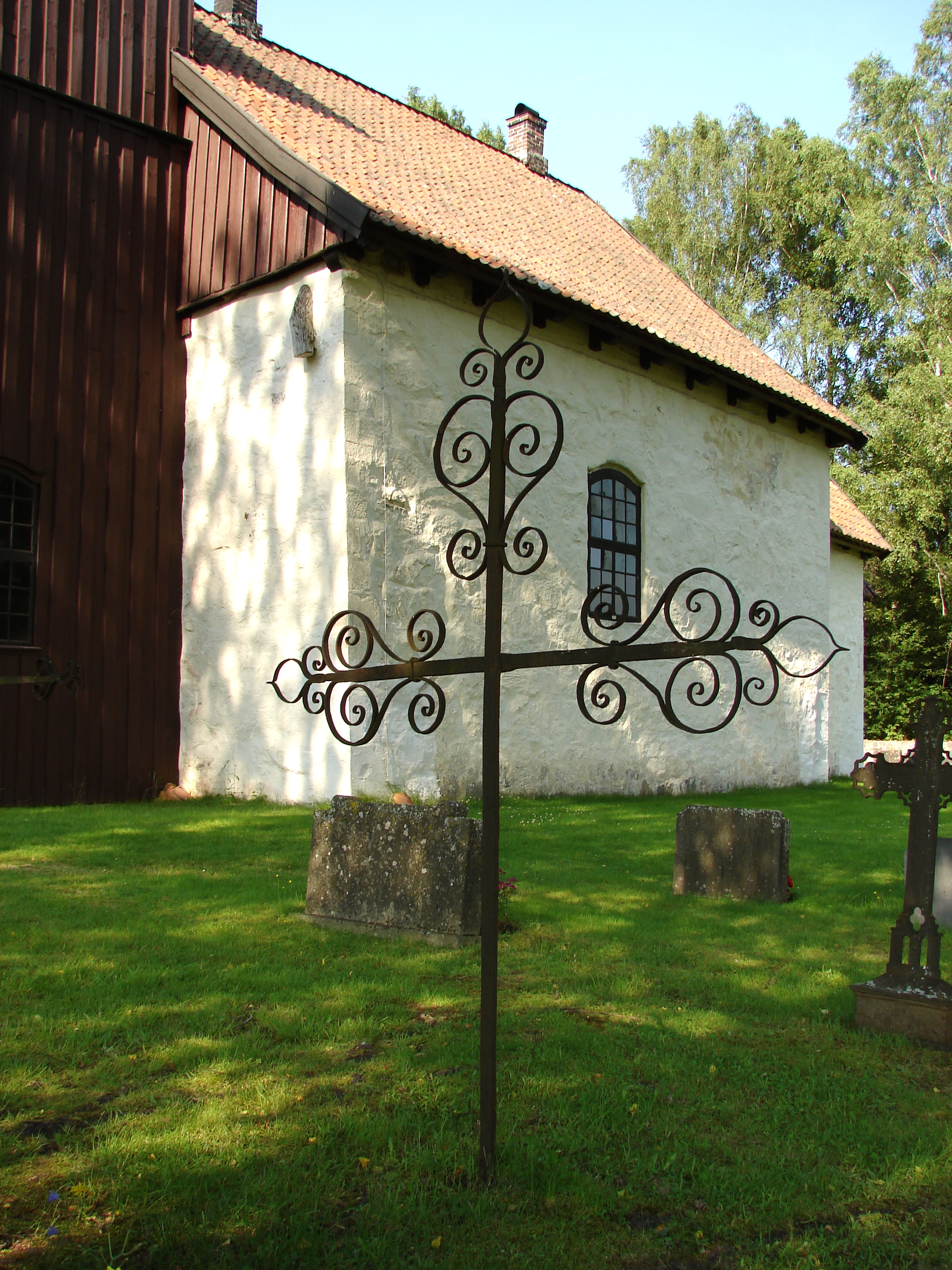 Gravminde ved Romnes Kirke, Telemarken